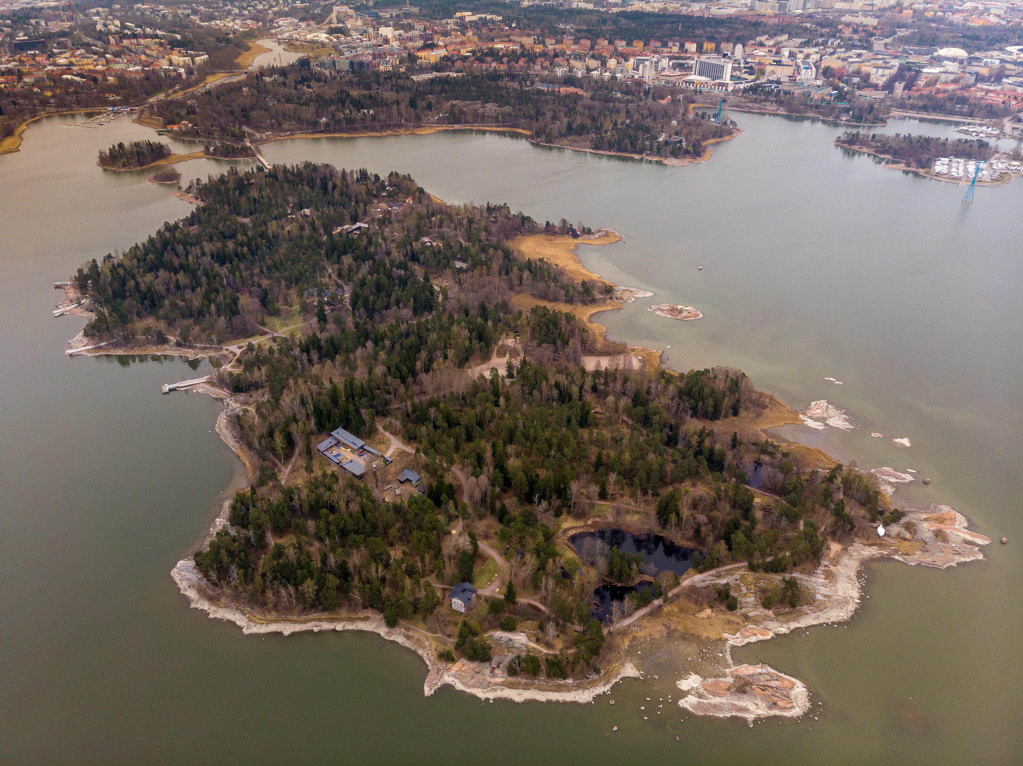 Insel Seurasaari in Helsinki